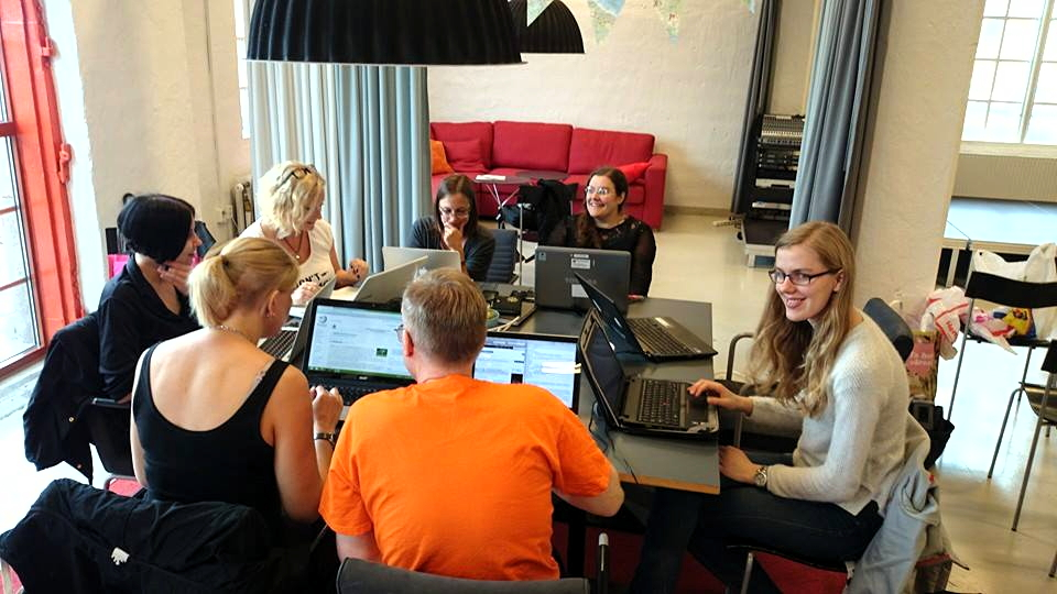 Skrivstuga i "Kvinnliga huvudpersoner på Wikipedia", på Litteraturhuset (Göteborgs Lagerhus).